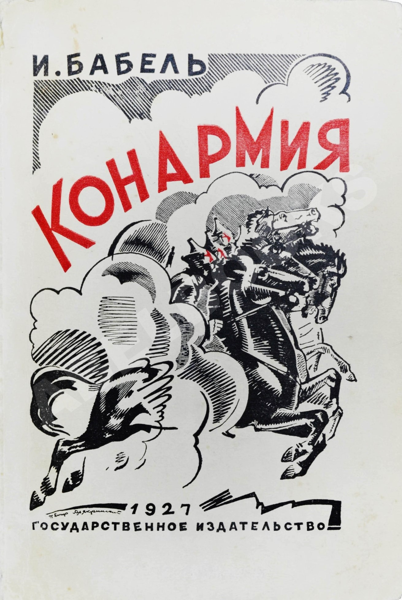 Исаак Бабель Сборник рассказов "Конармия"